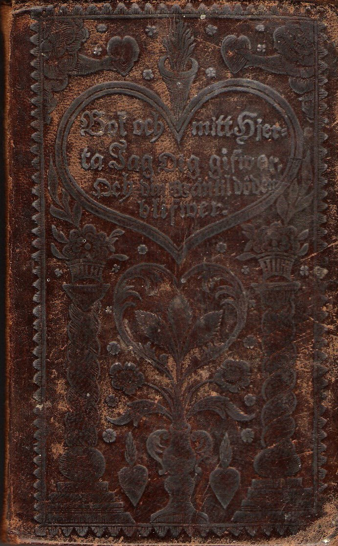 Framsidan till ett exemplar av 1819 års psalmbok, tryckt 1819.